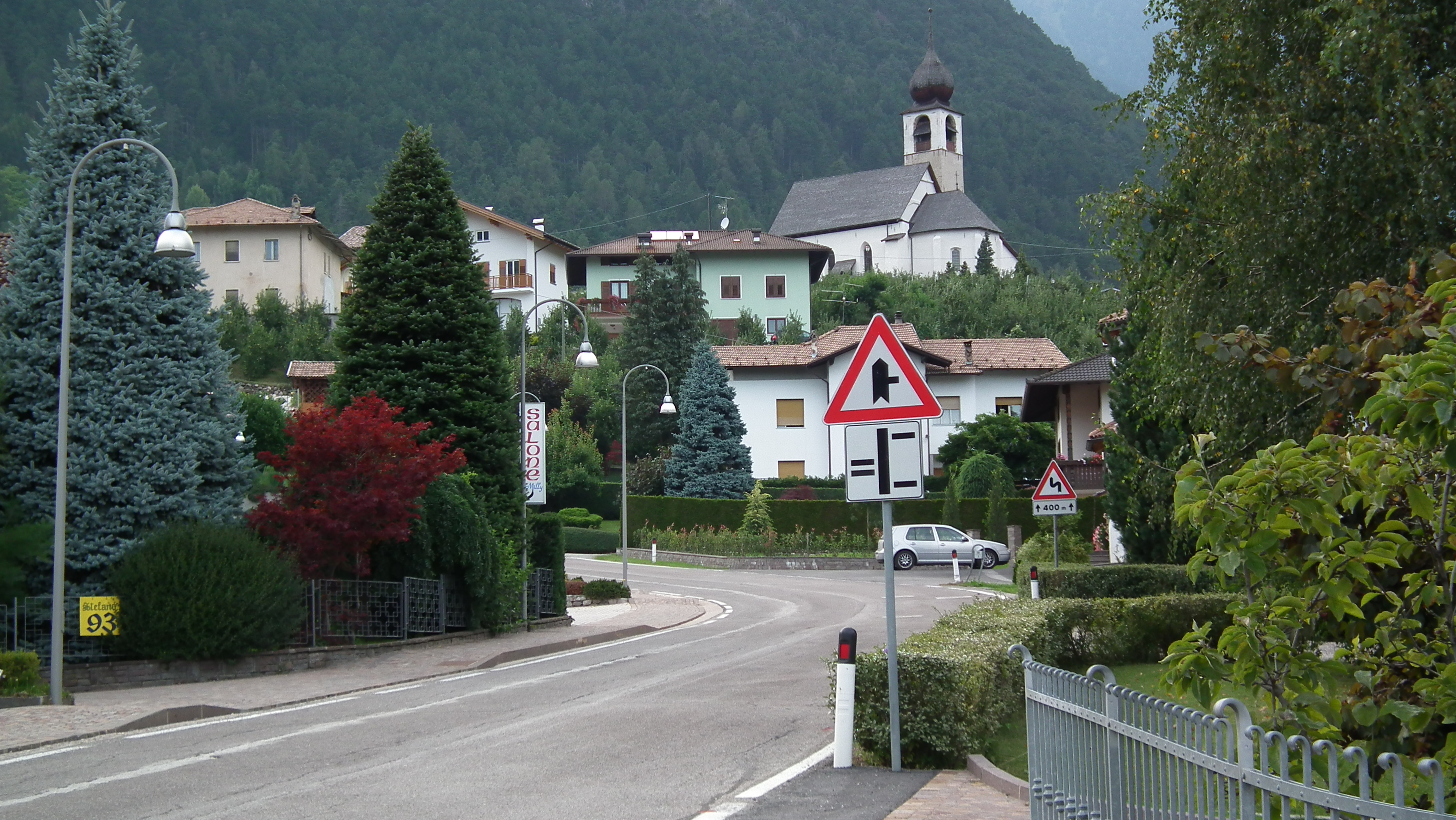 Veduta di CIS (TN)